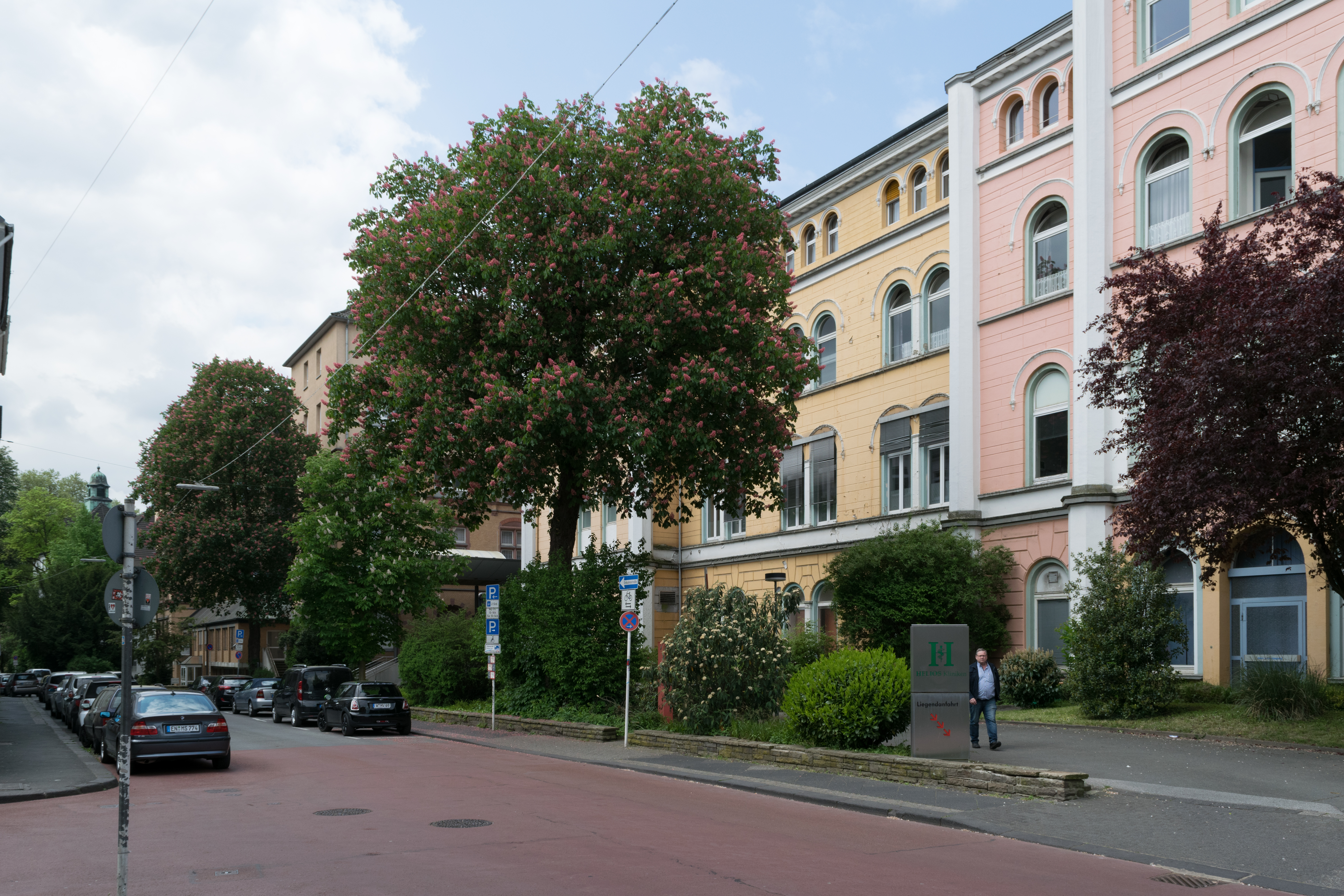 Arrenberger Straße, Wuppertal